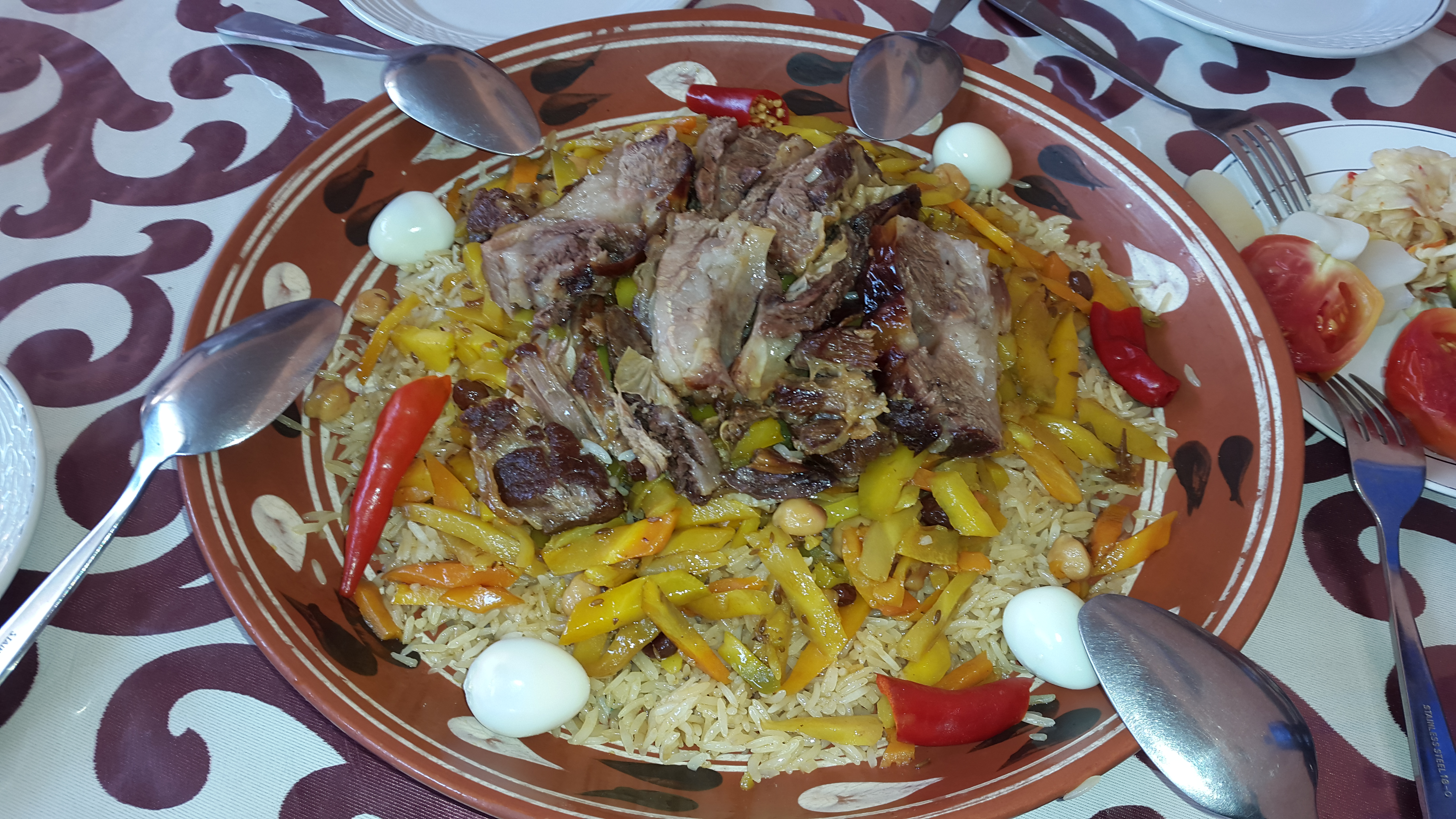 Самаркандский плов, приготовленный на льняном масле